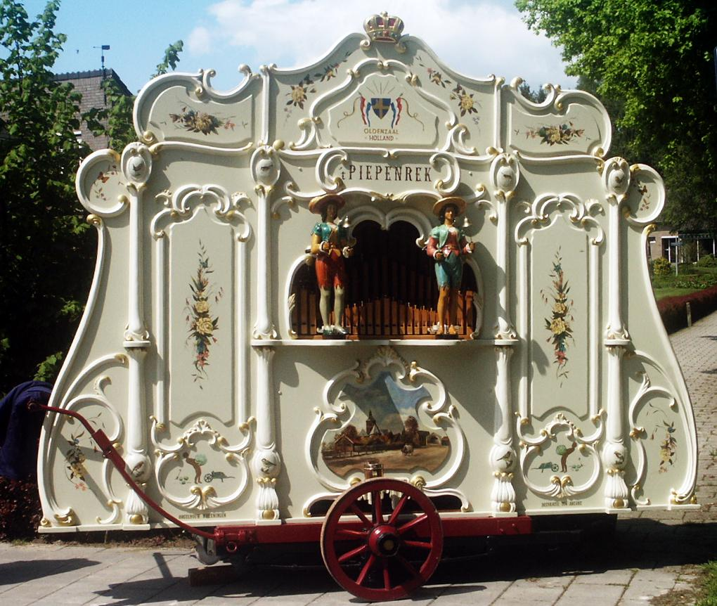 Oldenzaal stadsorgel ´t Piepenrek, draaiorgel